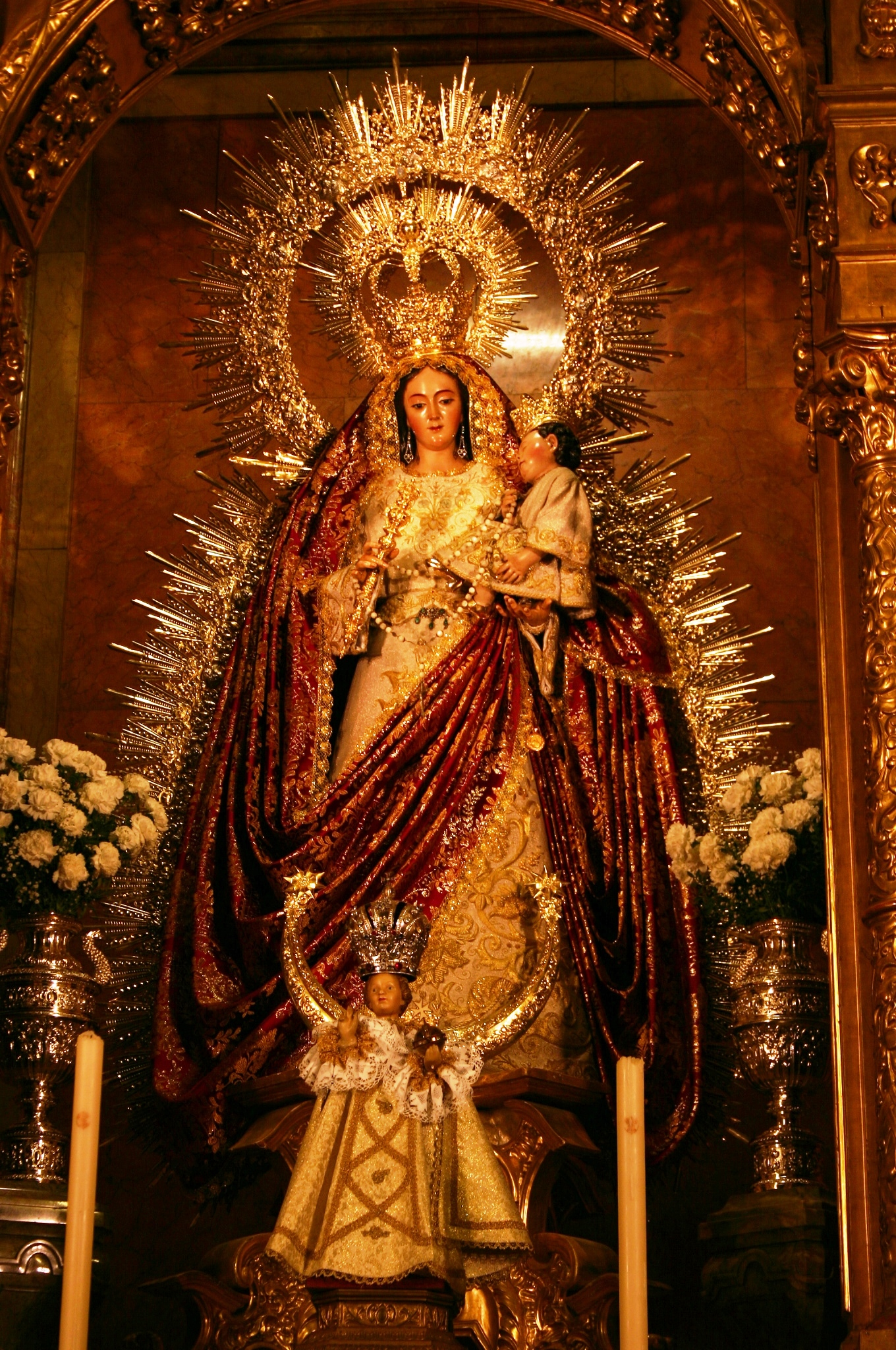 Nossa Senhora do Rosário